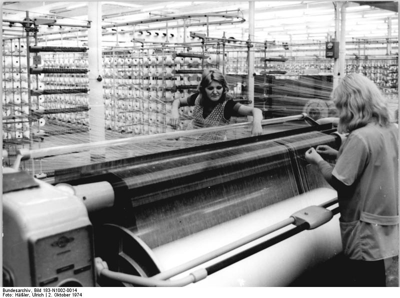 Neugersdorf, polnische Gastarbeiterinnen ADN-ZB Häßler 2-10-74 Bez. Dresden: Webautomaten aus der DDR und Zettelmaschinen aus der CSSR bilden eine technologische Einheit in der rationalisierten Weberei Neugersdorf des VEB Oberlausitzer Textilbetriebe. Ursula Sknypek (r) und Lucyna Bzowa -beide aus der VR Polen- können jetzt mit den anderen Werktätigen des Betriebes mit einer effektiveren Technologie unter günstigeren Arbeitsbedingungen mehr modische Gewebe für Anzug- und Hemdenstoffe herstellen.